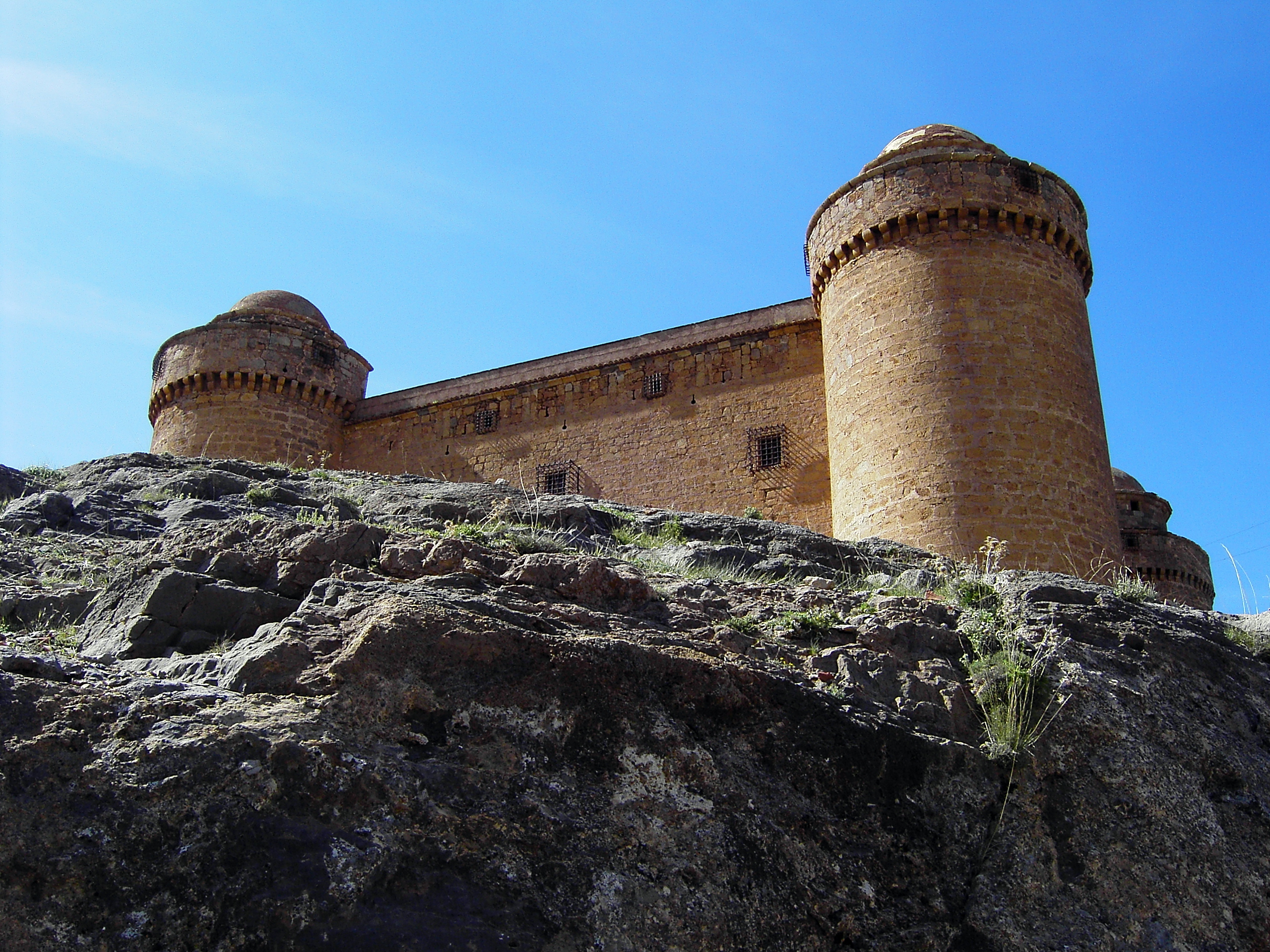 Castillo de la Calahorra (Granada, España)